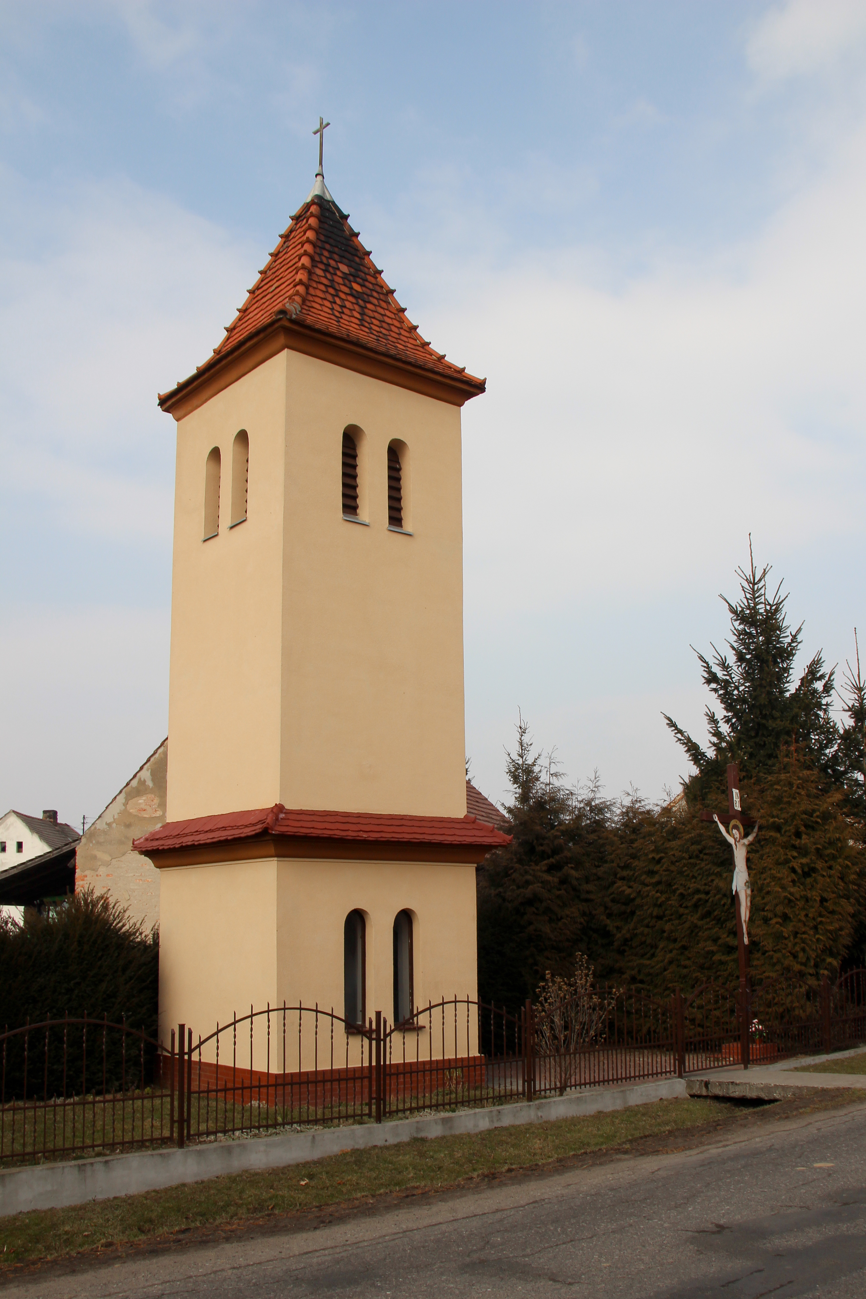 Polana – wieś w Polsce, w województwie opolskim, w powiecie brzeskim, w gminie Grodków.